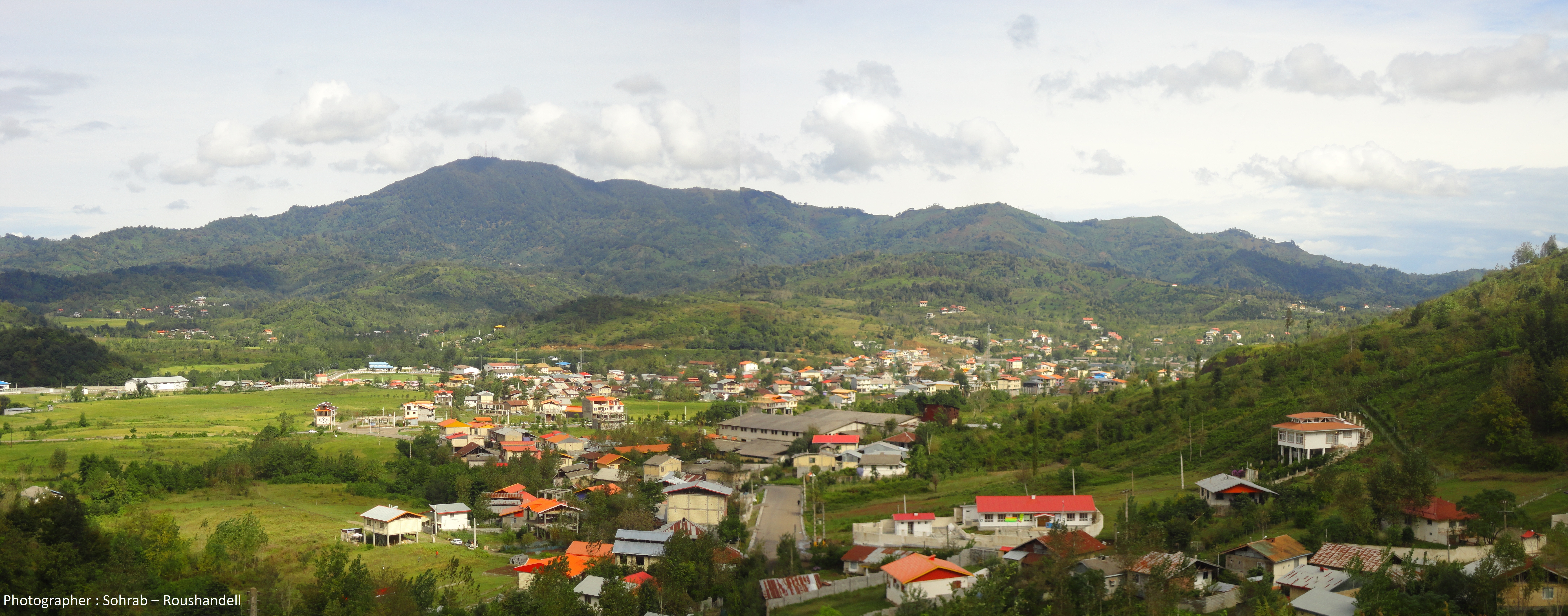 شهر اطاقوَر /9 مهر 95